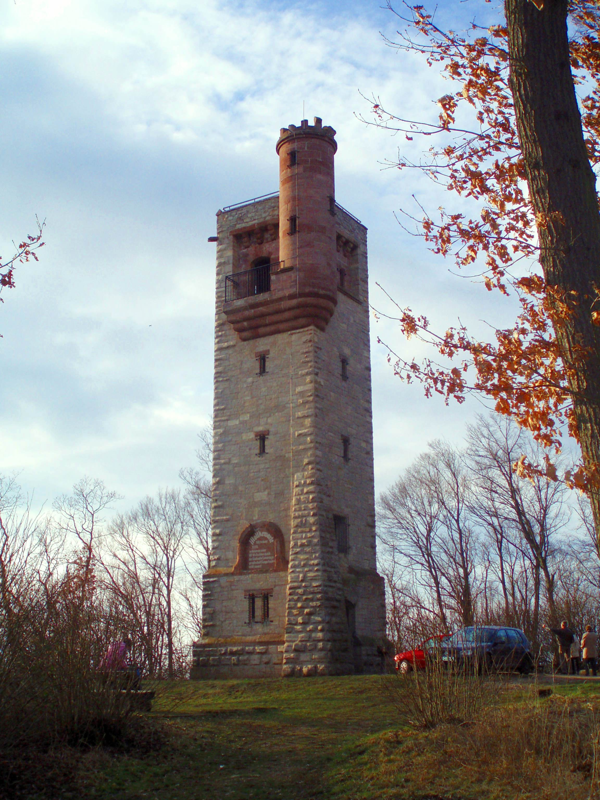 Moltkewarte bei Lengefeld